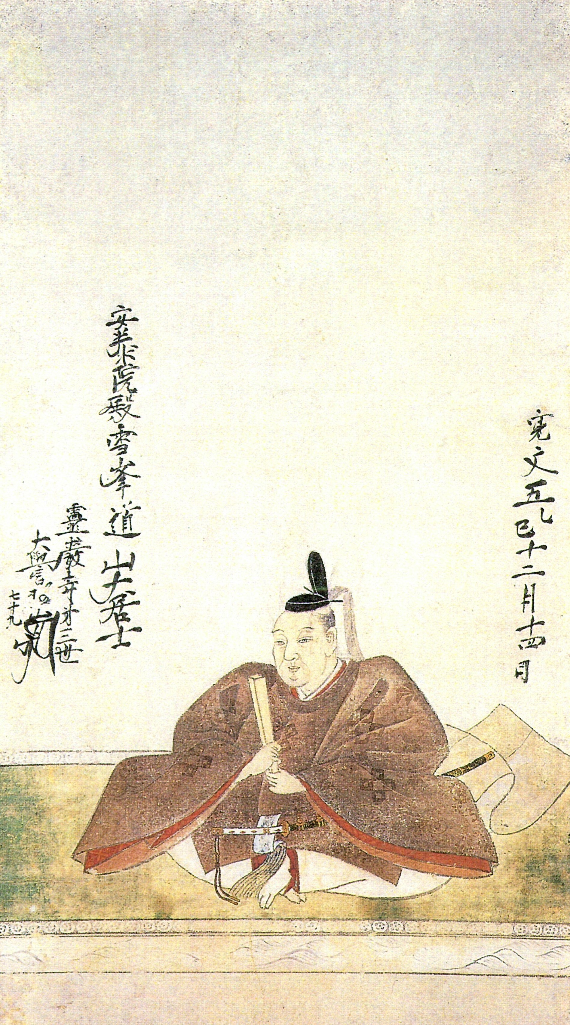 京極高通の肖像。